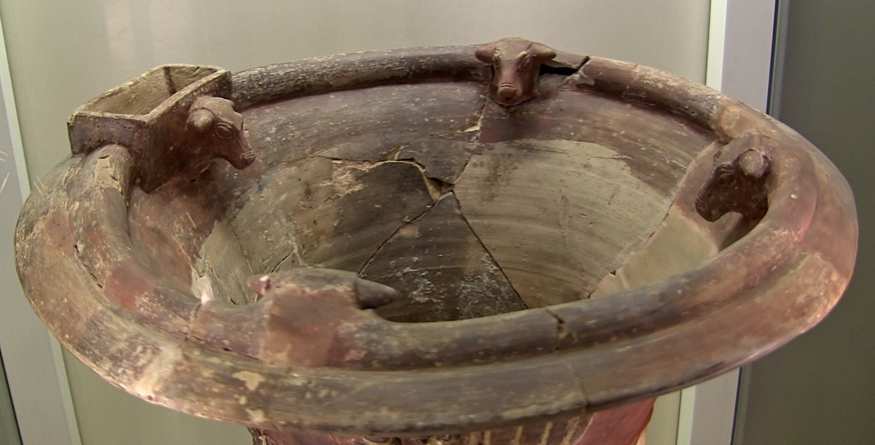 Archäologisches Museum Çorum, Zentraltürkei, frühhethitische Vase A aus Hüseyindede, oberer Rand mit Stierköpfen